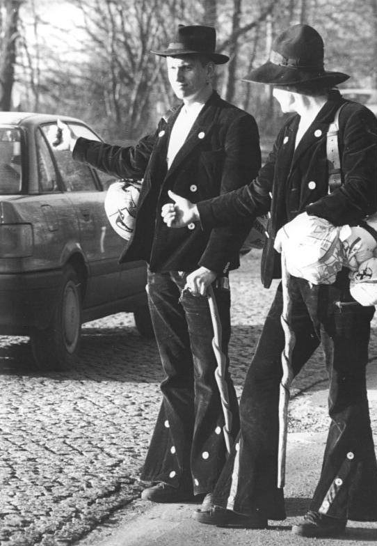 Erfurt, Zimmermänner auf der Walz ADN-Ralf Hirschberger 10.12.1990 Erfurt: Vielleicht nicht ganz stilecht, aber immerhin in der traditionellen Zimmermannstracht, gehen diese beiden Zimmerer für drei Jahre auf Walz, für Handwerksburschen nun auch in den neuen Bundesländern möglich.